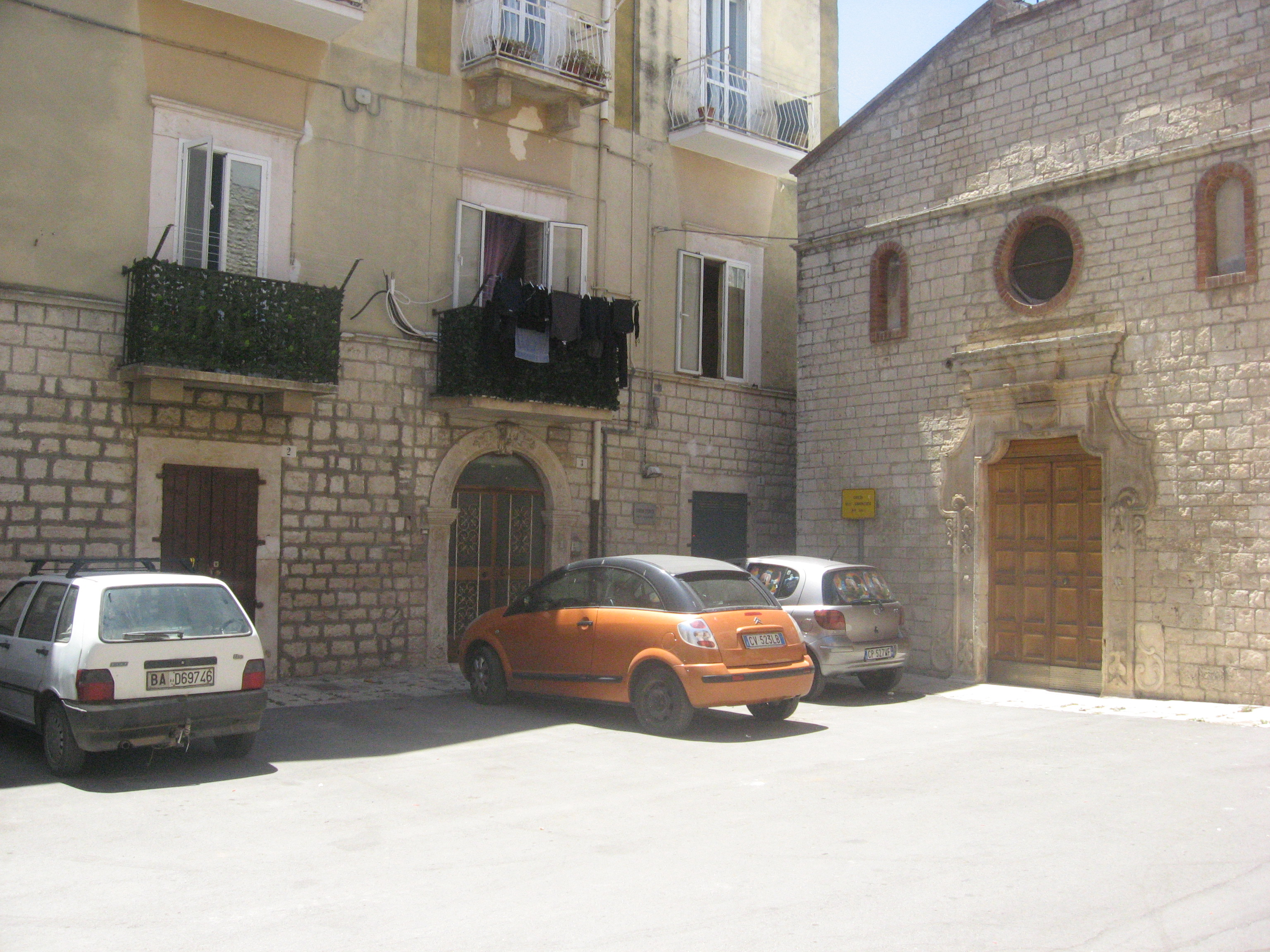 Largo Annunziata, Ruvo di Puglia